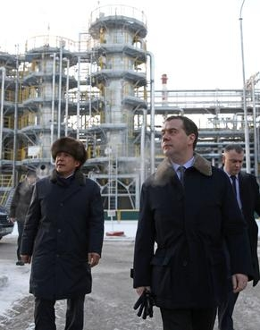 Рустам Минниханов и Дмитрий Медведев во время посещения ТАНЕКО (слева направо)